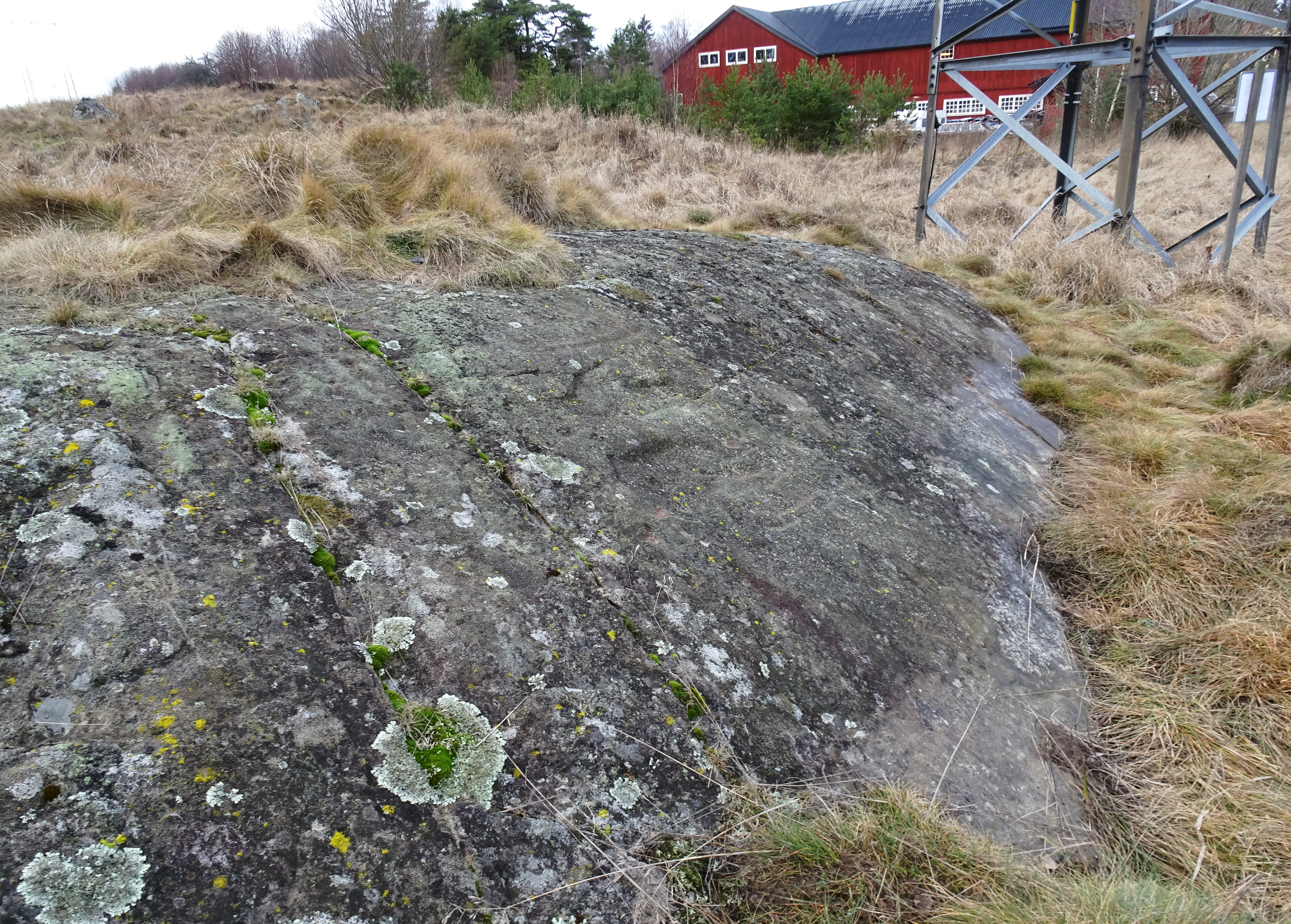 Hallingeristningen